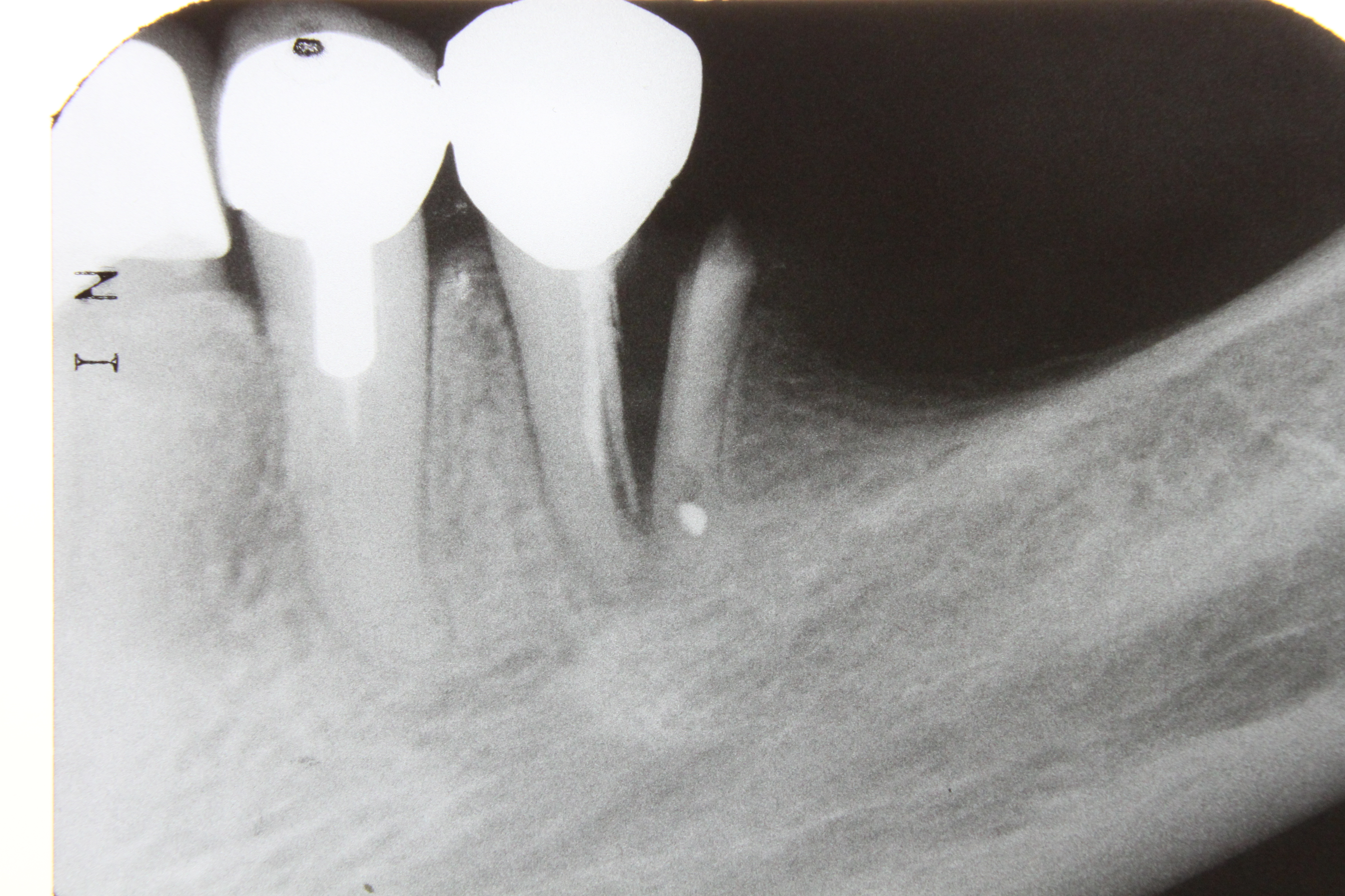 Zahnfilm; Röntgenbilder Zähne Eine Bildunterschrift lautete: "Wurzelfraktur zwei Jahre nach einer Wurzelbehandlung"